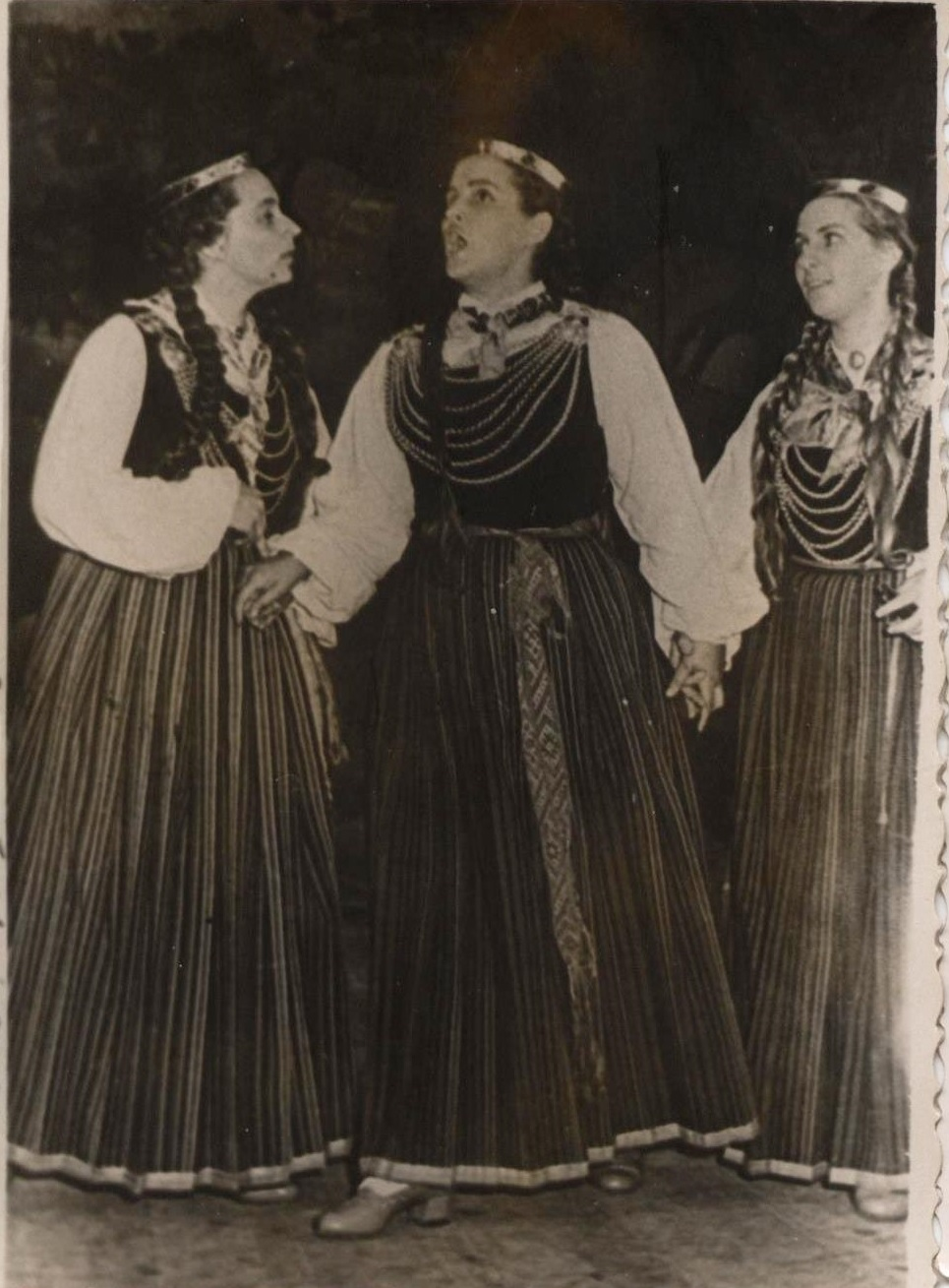 Uzvedums "Līvu zeme - dzintarzeme", 1957. gads.